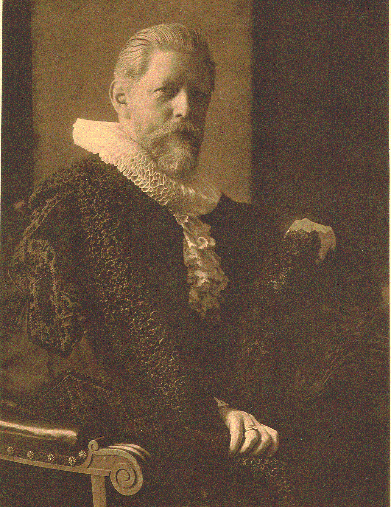 Hugo Roeloffs, Hamburger Senatssyndikus